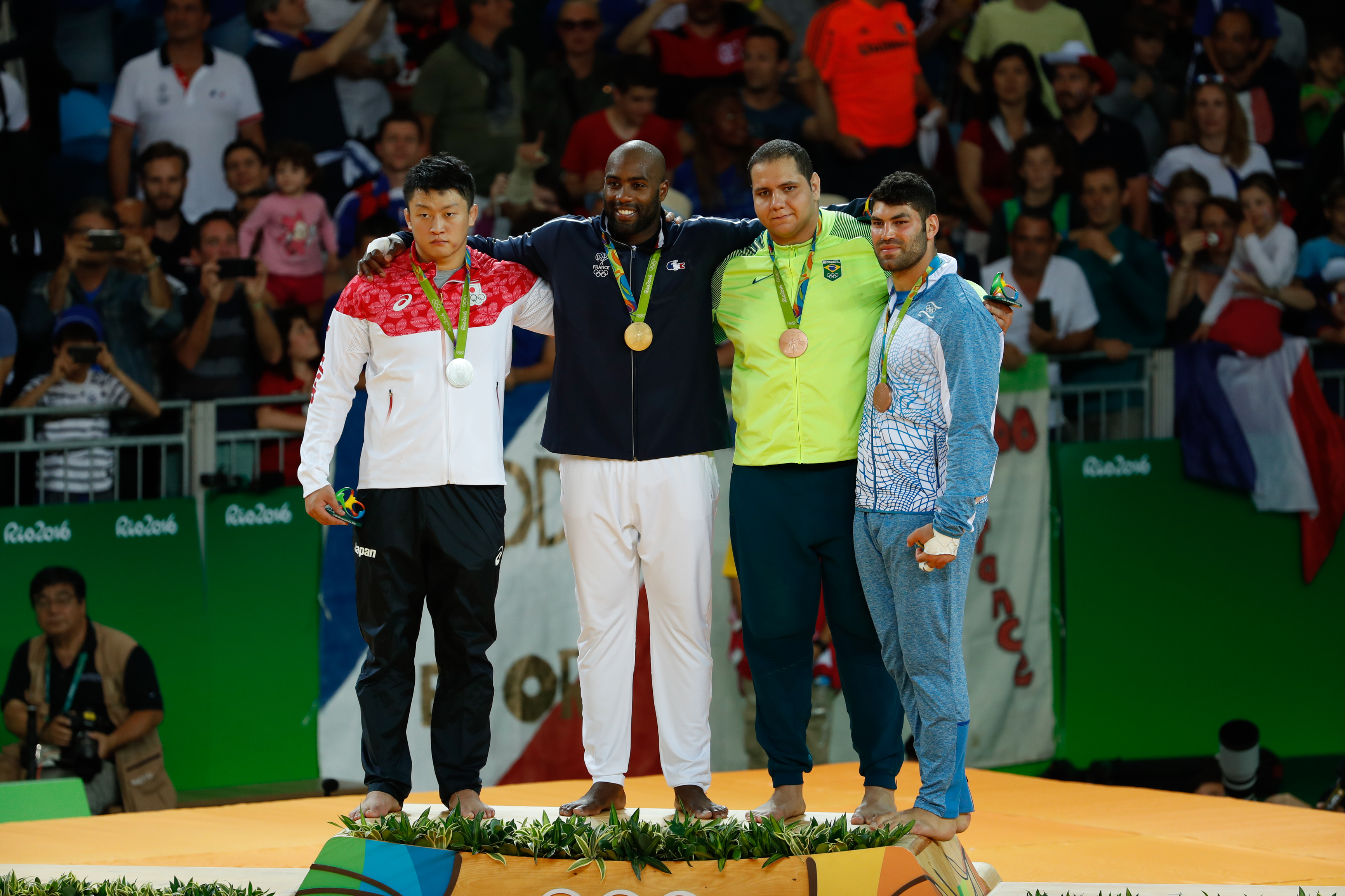 Rio de Janeiro - Judoca Rafael Silva, o Baby ganha medalha de bronze nos Jogos Olímpicos Rio 2016 (Fernando Frazão/Agência Brasil)